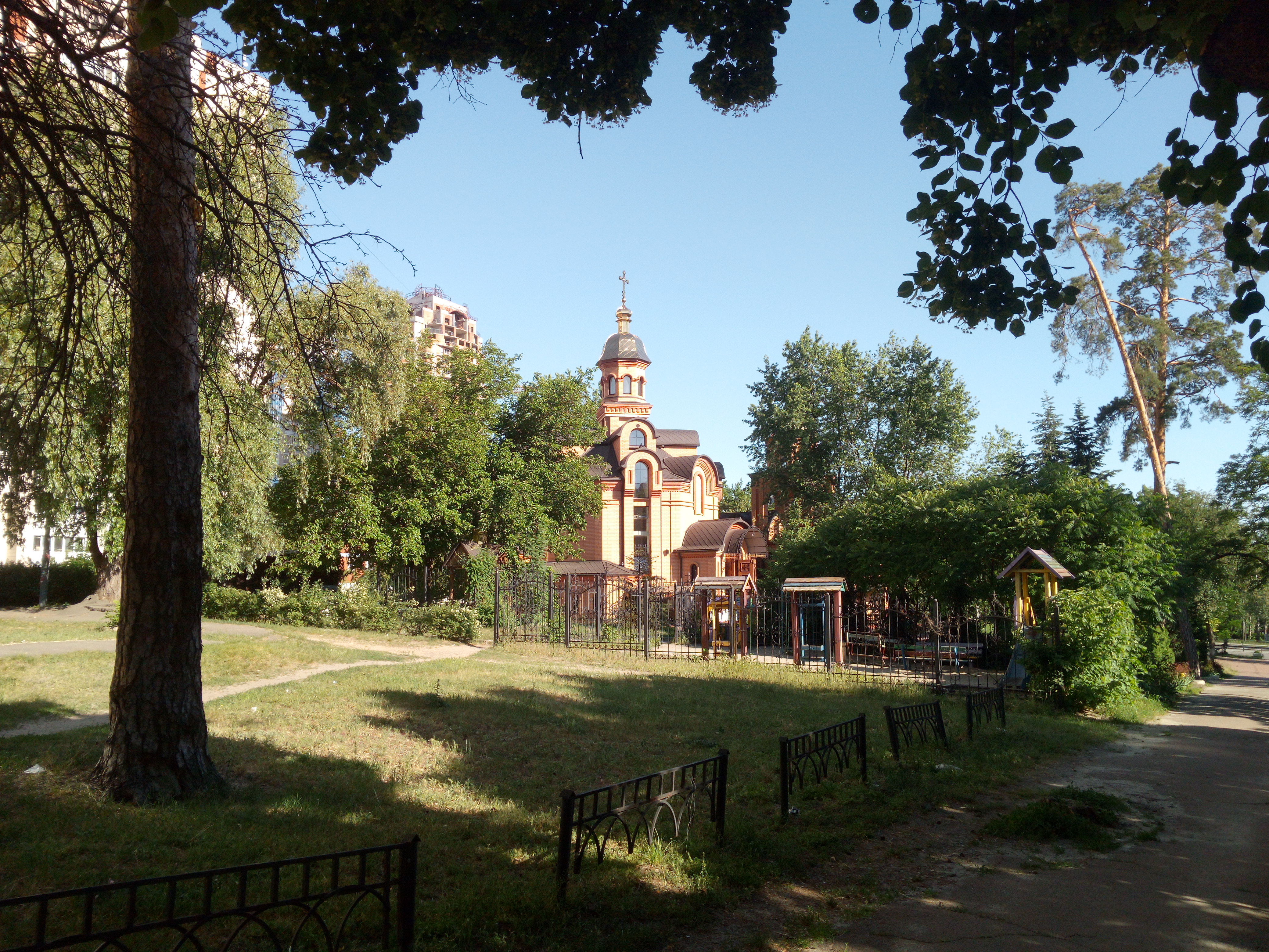 Церква святителя Феодосія Чернігівського на Чорнобильській вулиці, Київ